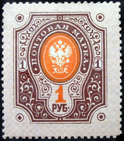 Марка Великого княжества Финляндского, восьмой выпуск, 1891, 1 рубль